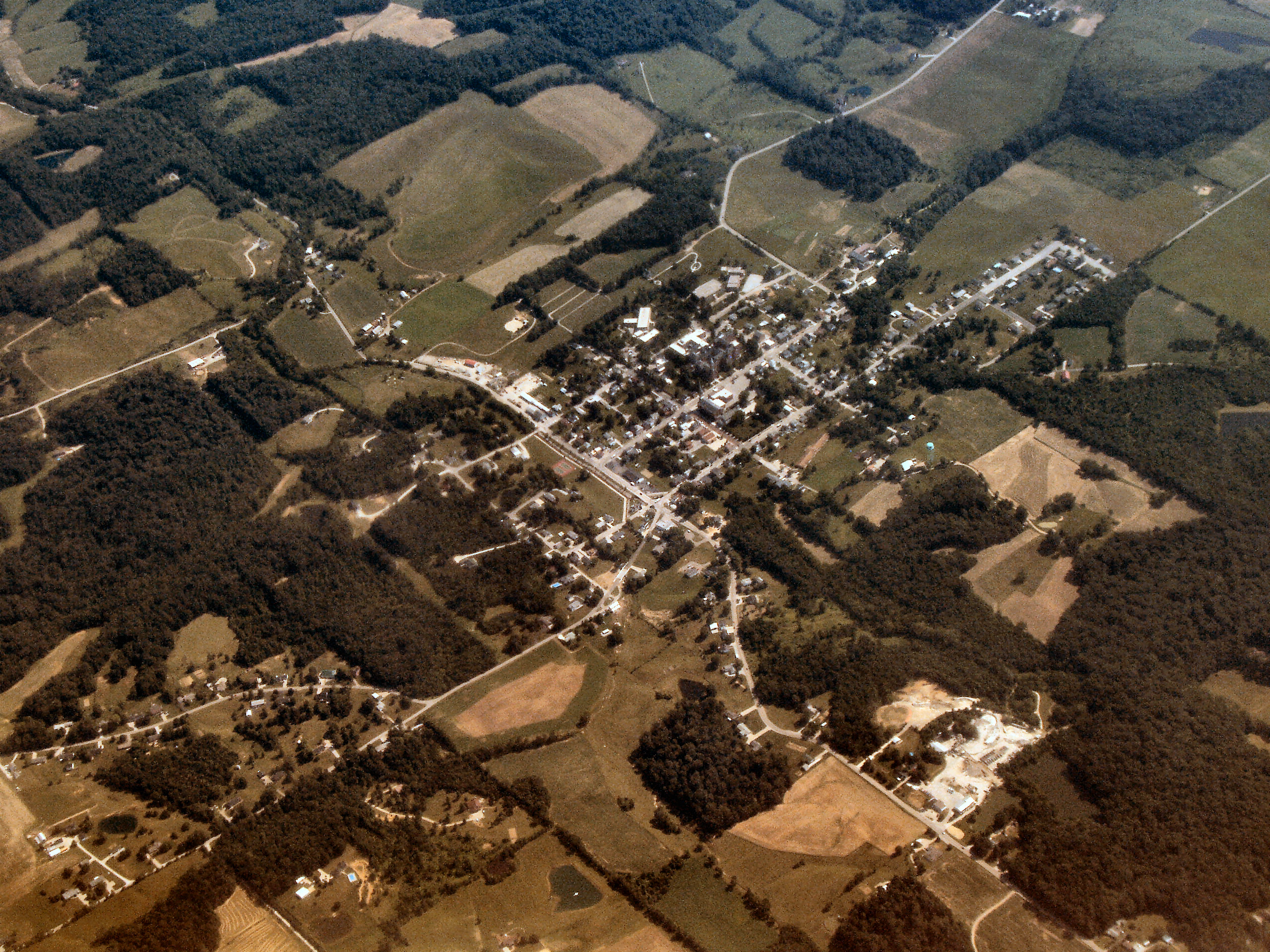 Oldenburg, Indiana from 25,000 feet. Photo by Derek Jensen (Tysto), 2005-June-20